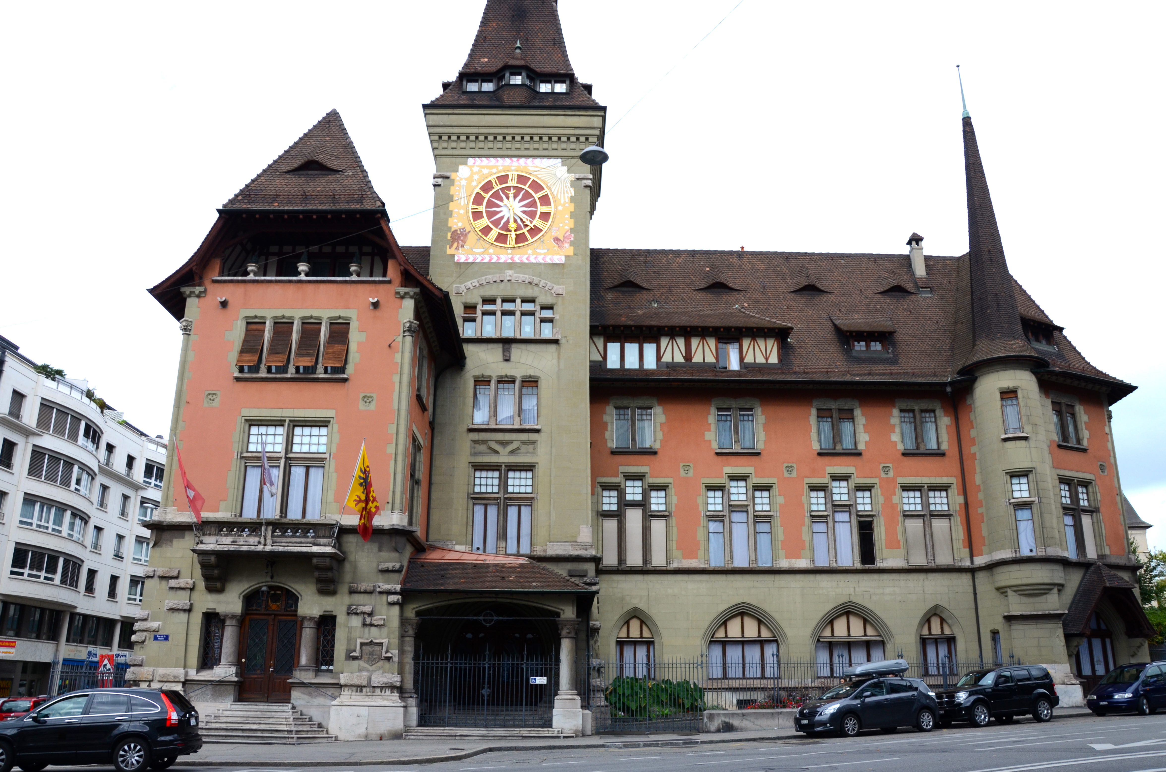 Mairie des Eaux-Vives, Rue de la Mairie 37, Genève